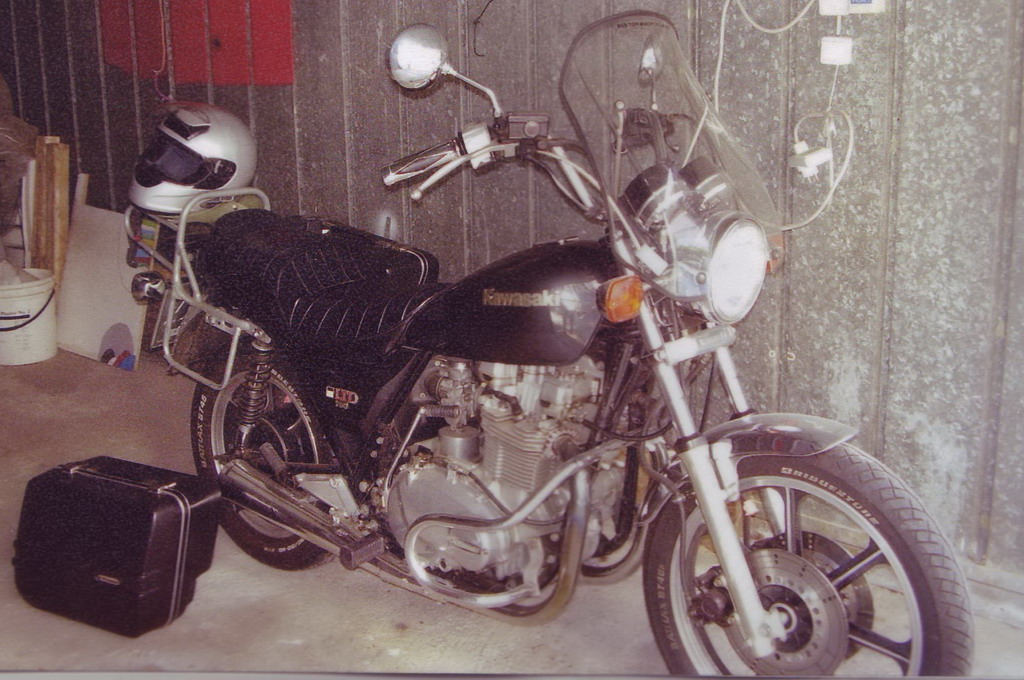 Z750 Twin LTD